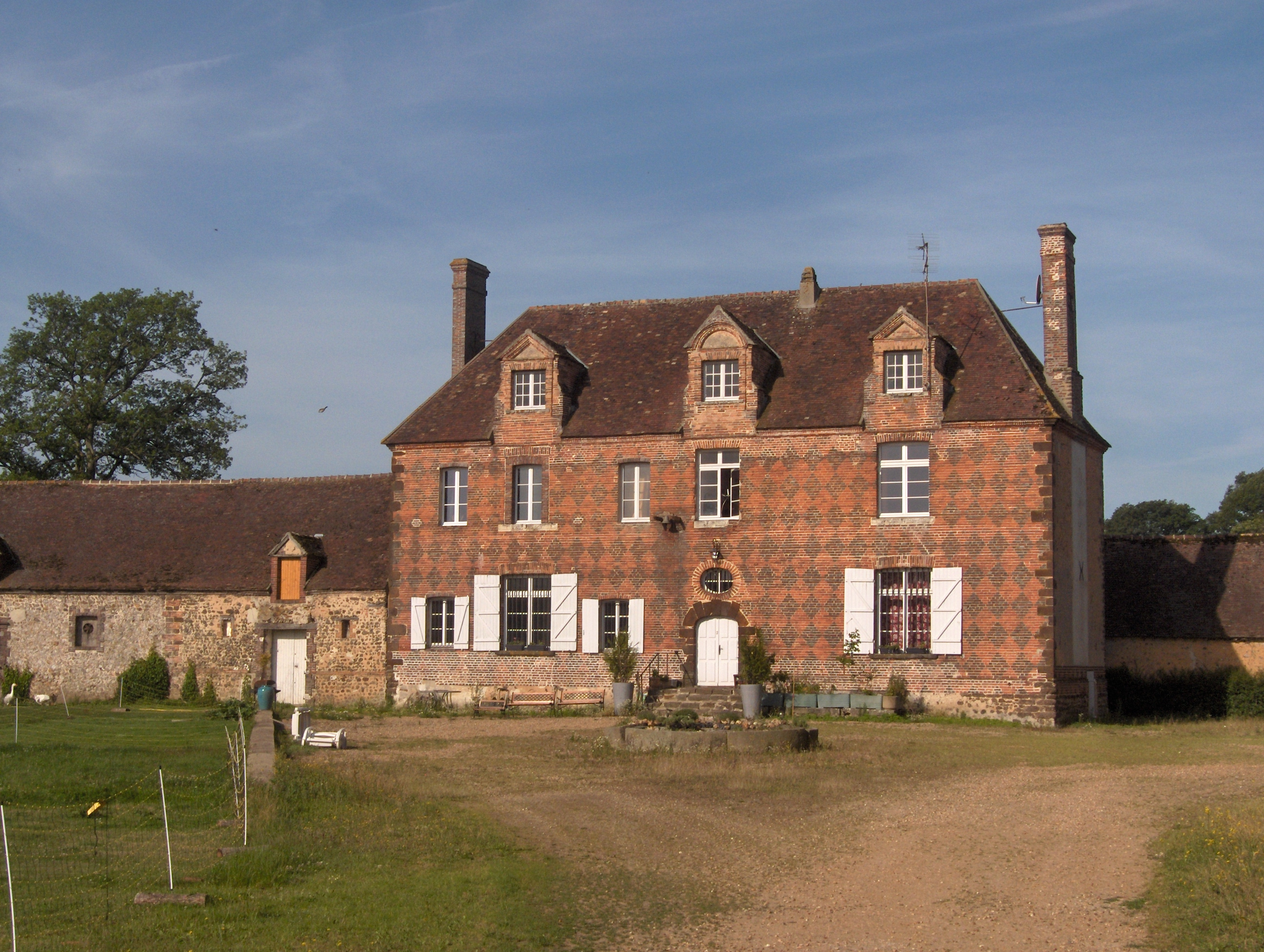 Ce manoir, ancien logis seigneurial, est construit en briques qui dessinent des motifs de losanges.